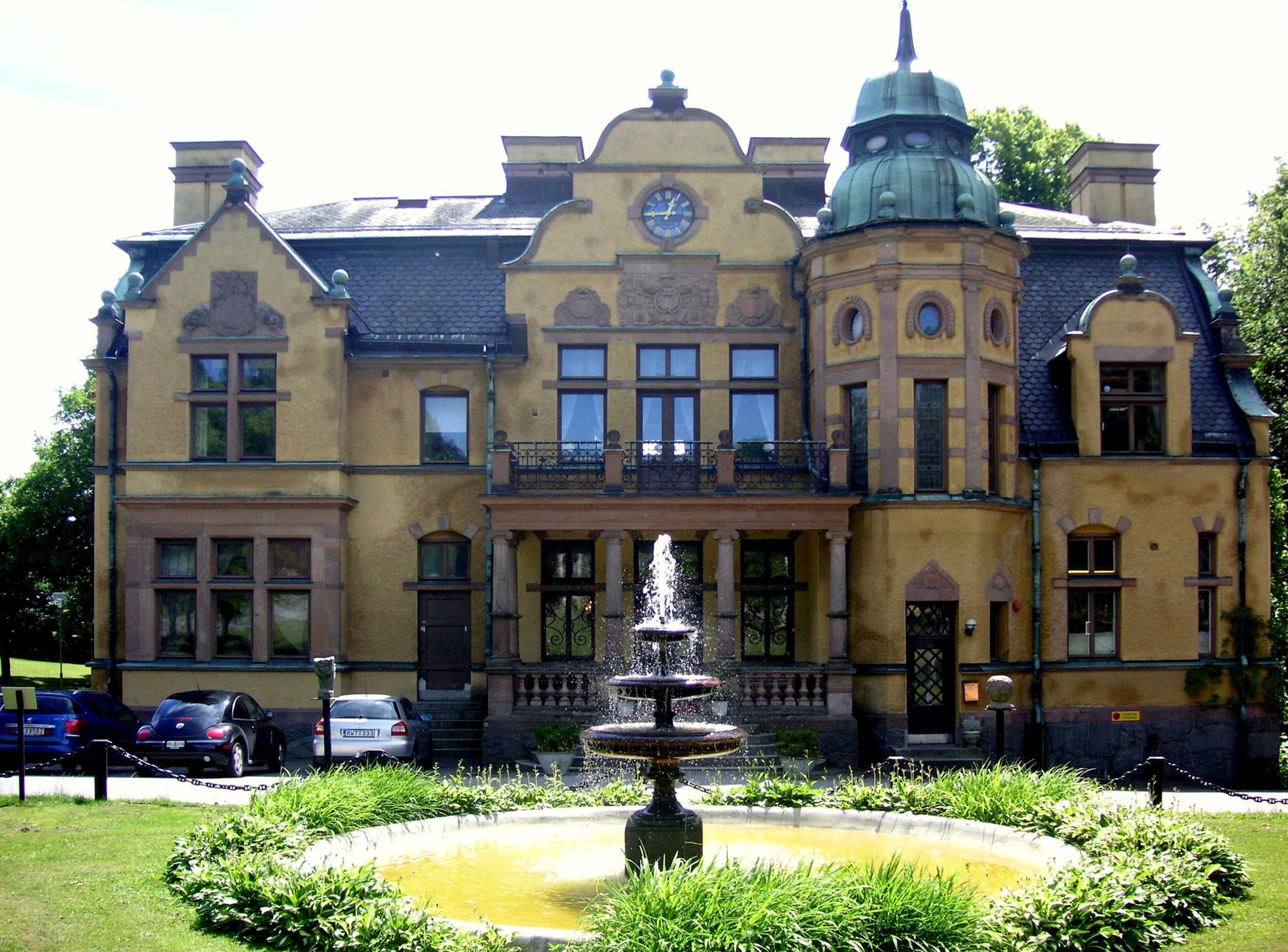 Ljunglöfska slottet i Blackeberg, Bromma, Stockholm